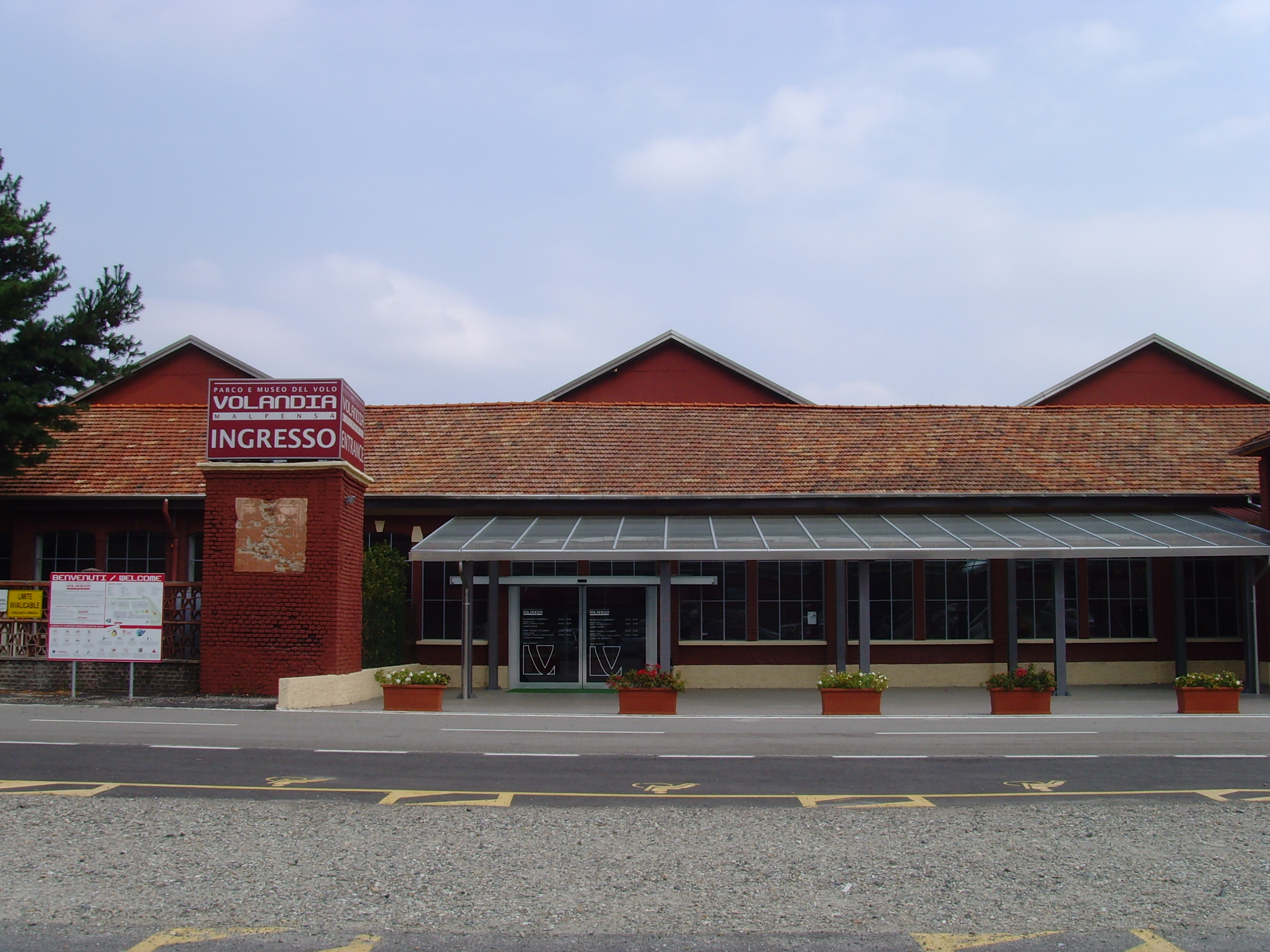 l'ingresso al museo Volandia, nei padiglioni che furono sede della Caproni a Somma Lombardo, adiacente all'Aeroporto di Milano-Malpensa.